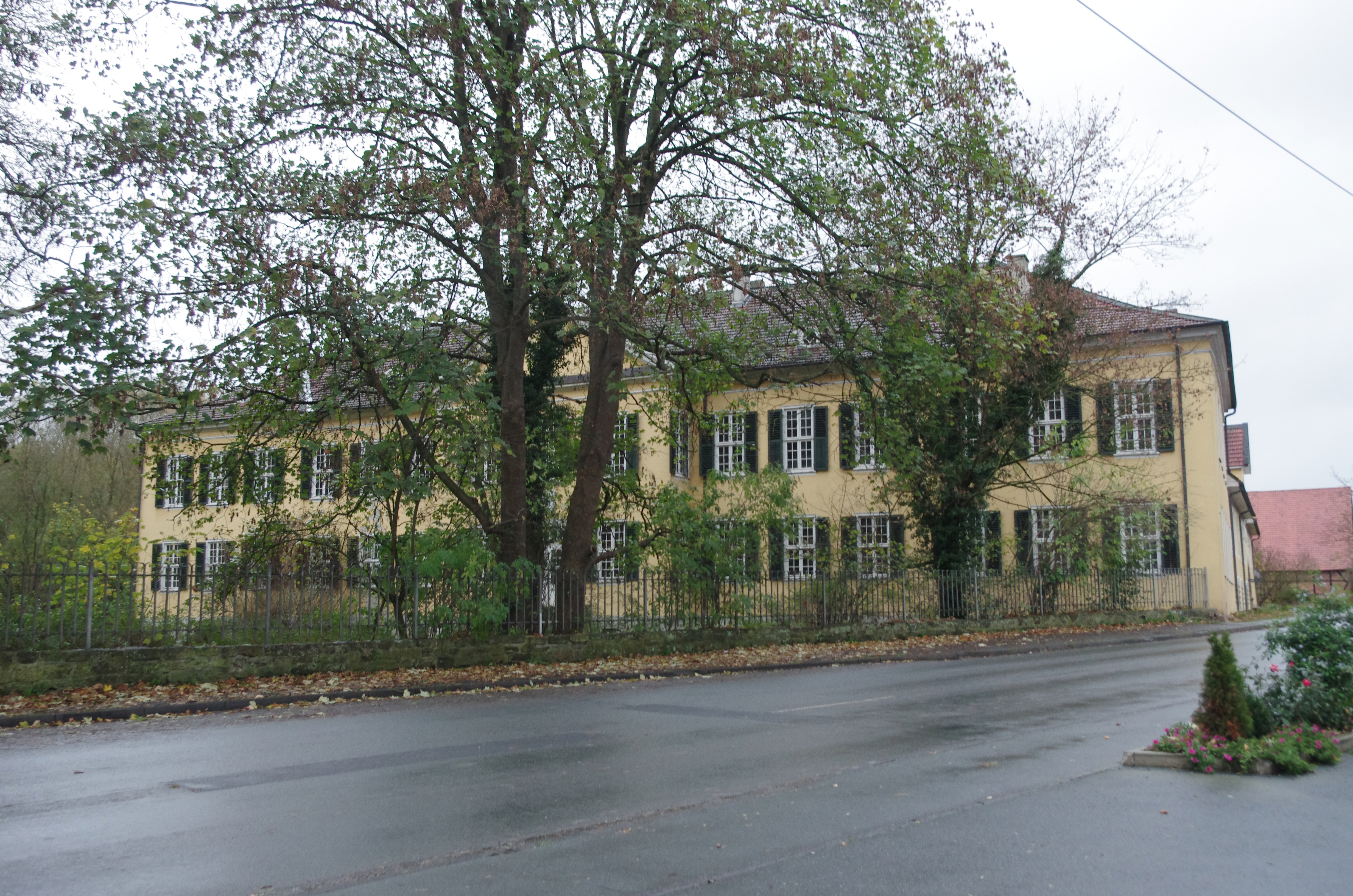 Edertal Ortsteil Bergheim in Hessen. Das Schloss wurde 1692 erbaut.